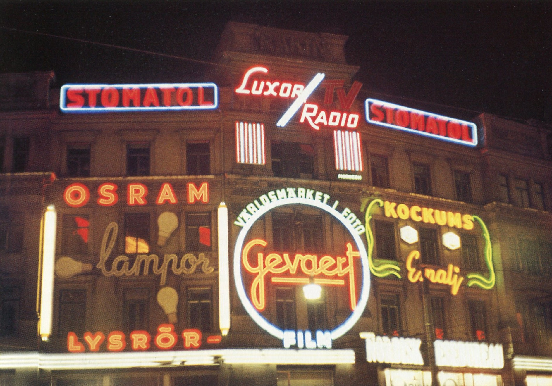 Klassisk ljusreklamfasad vid Stureplan i Stockholm på 1950- och 1960-talen.